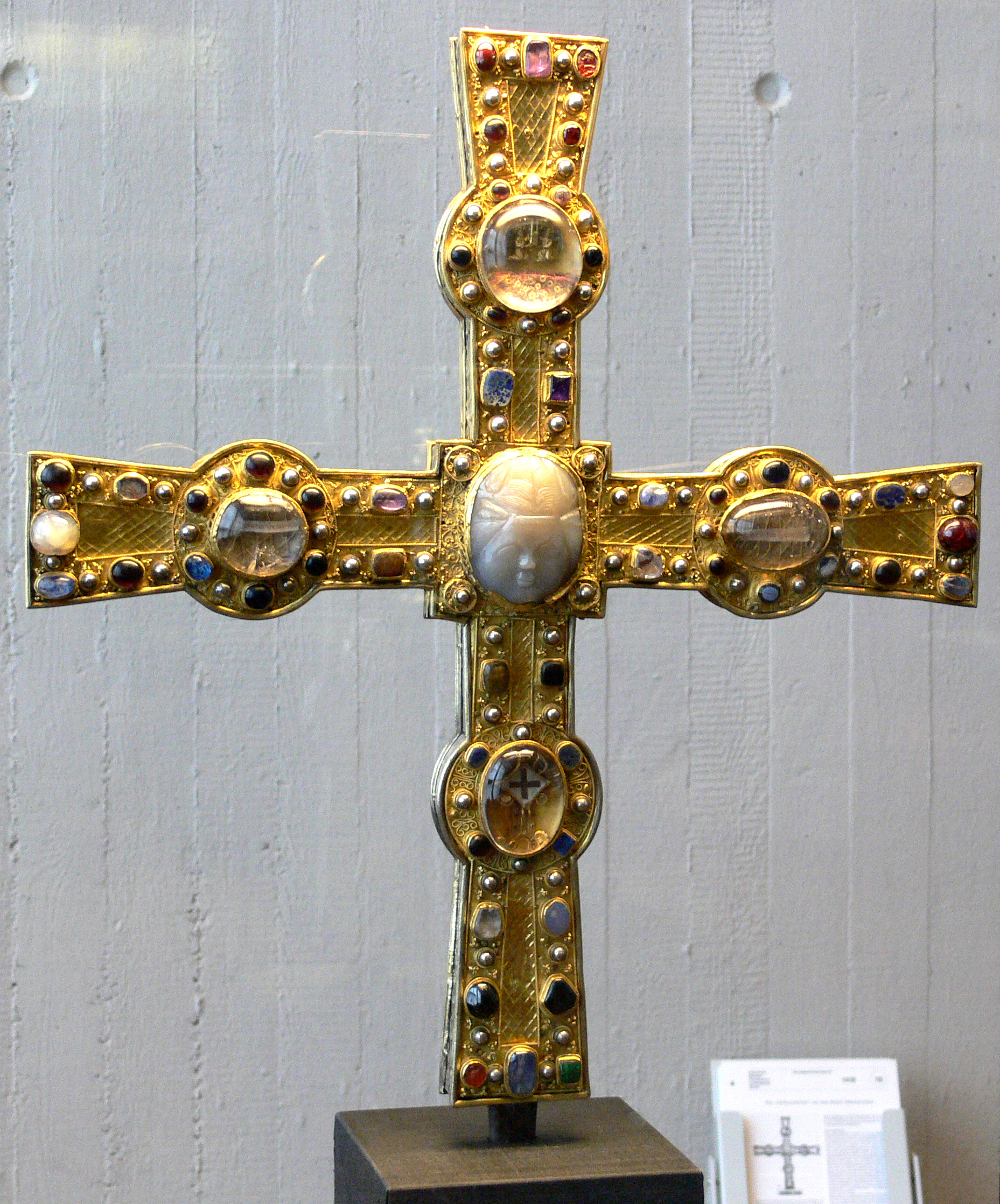 „Heinrichskreuz“ aus dem Münsterschatz in Basel. Kunstgewerbemuseum Berlin, Inv. Nr. 17,79. Vorderseite: Gold, Edelsteine, Bergkristall, westdeutsch, 1. Viertel 11. Jh.